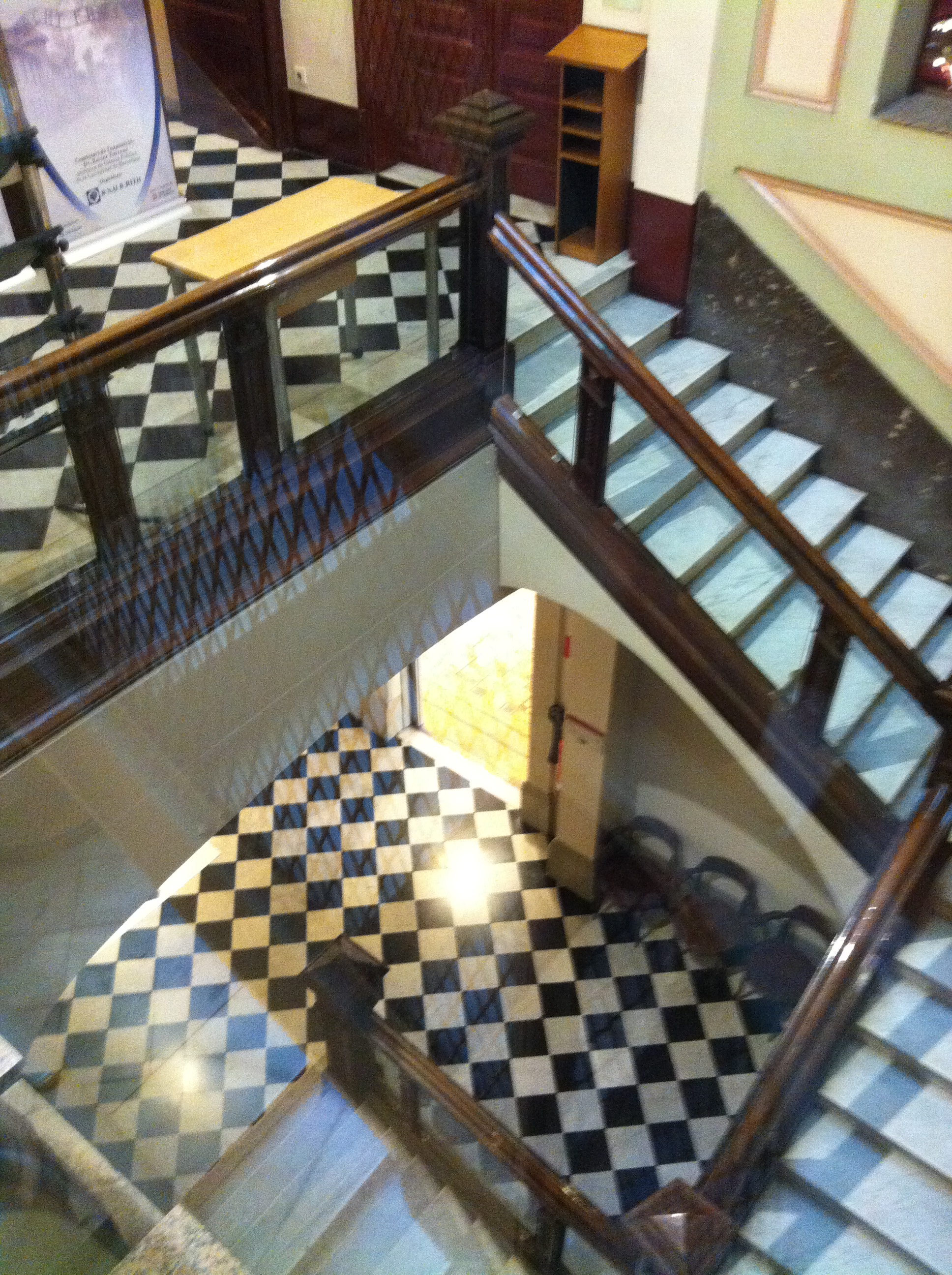 Casa Elizalde Escala Interior